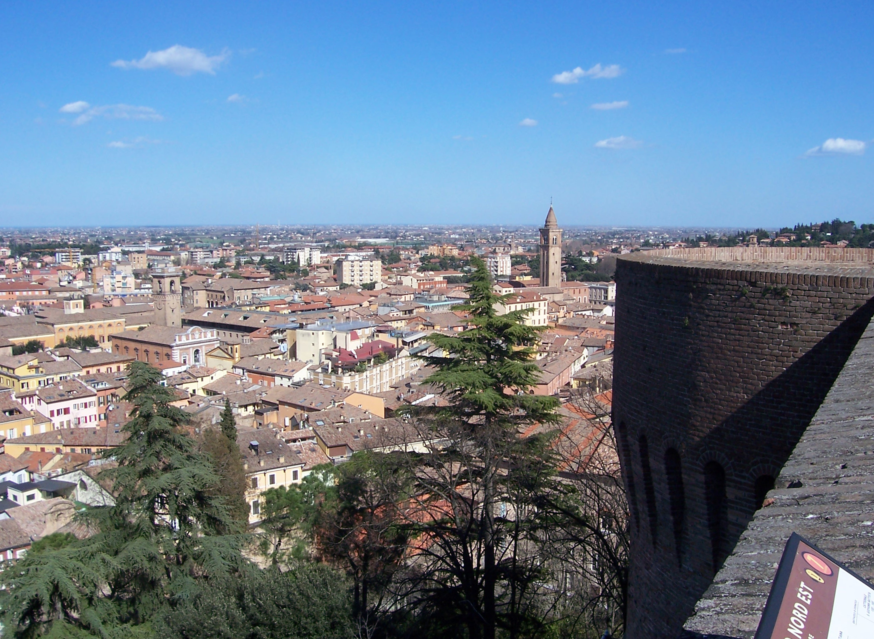 Panorama sulla "città malatestiana" dagli spalti della Rocca Malatestiana di Cesena